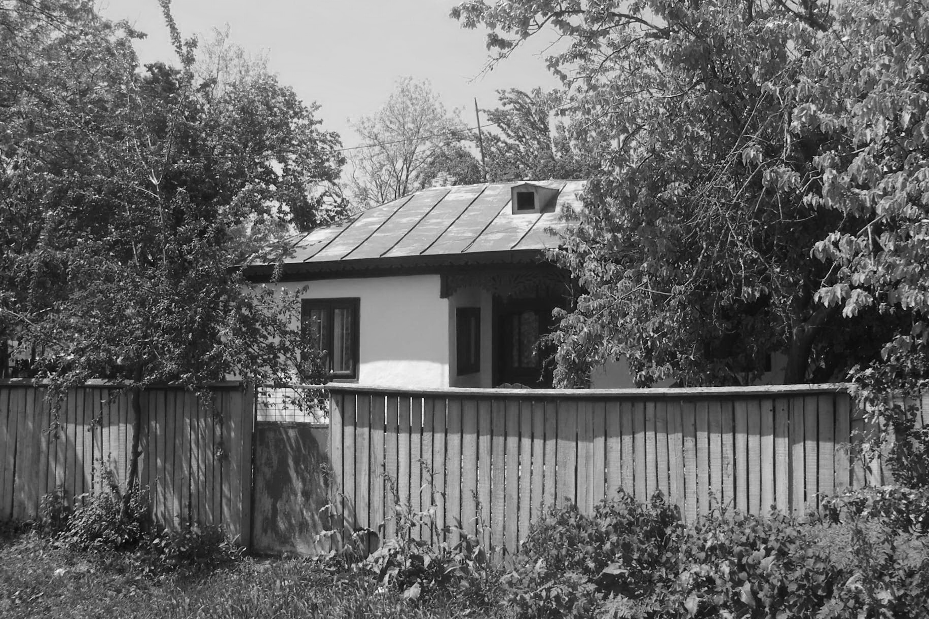 Comuna Bordei verde Locuinta specifica din anii 1950-60 Restricţii - fără restricţii